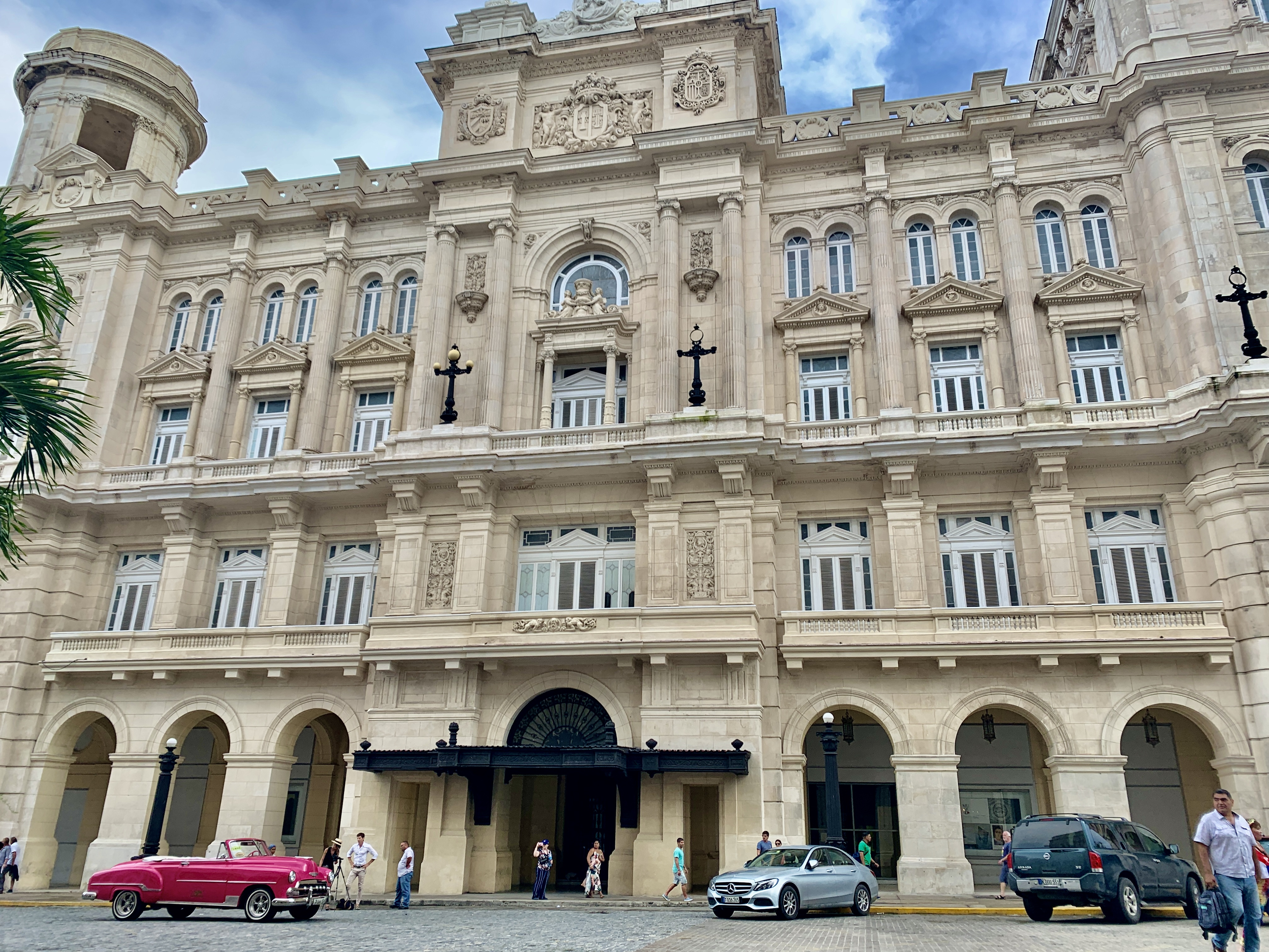 Meseo de Bellas Artes de La Habana.